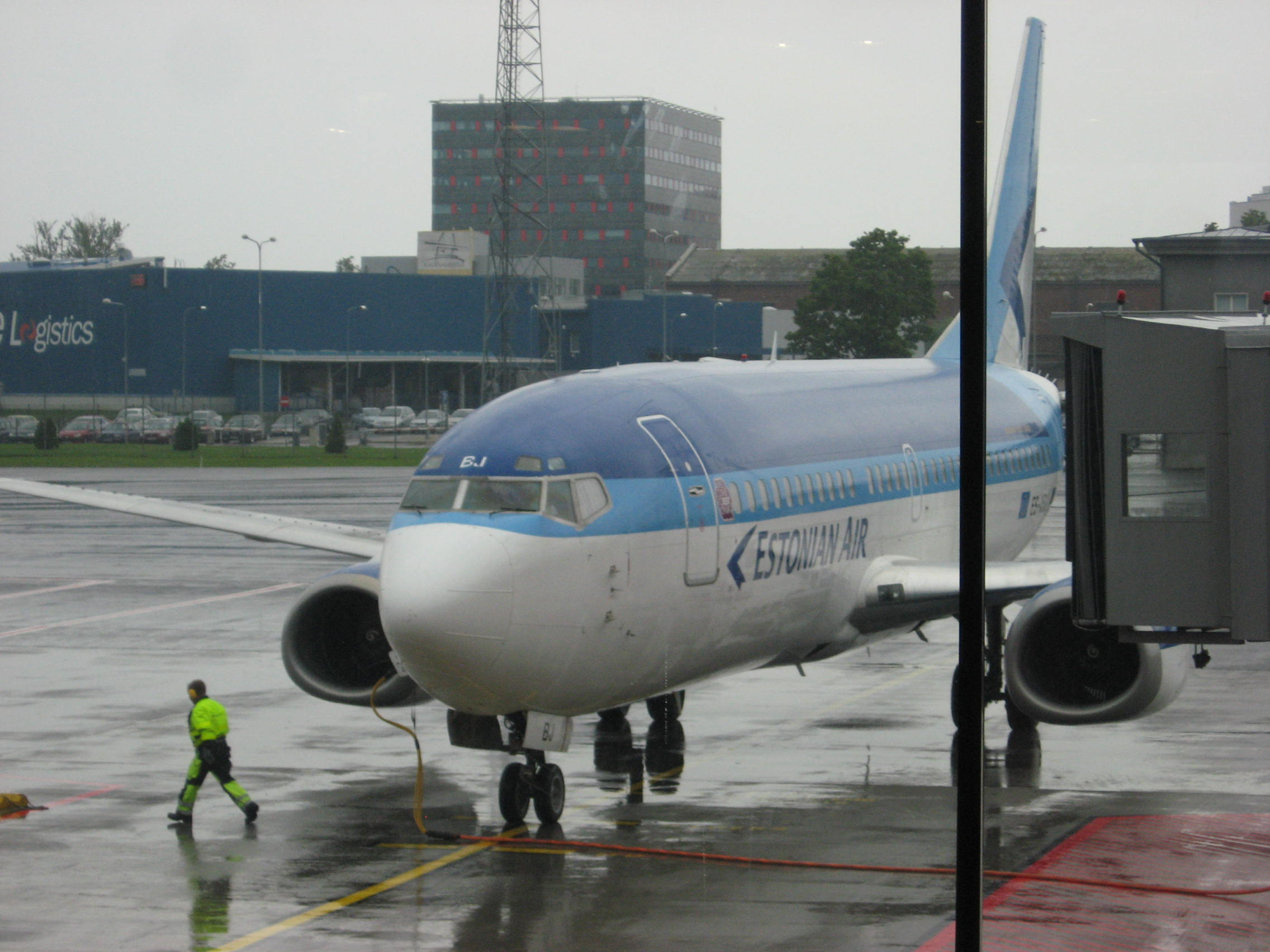 Estonian Airi Boeing 737-300 Tallinna lennujaamas.